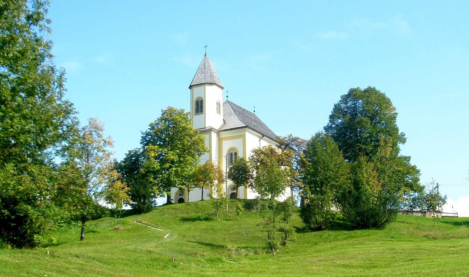 Wallfahrtskirche Maria Heimsuchung (Ettenberg)